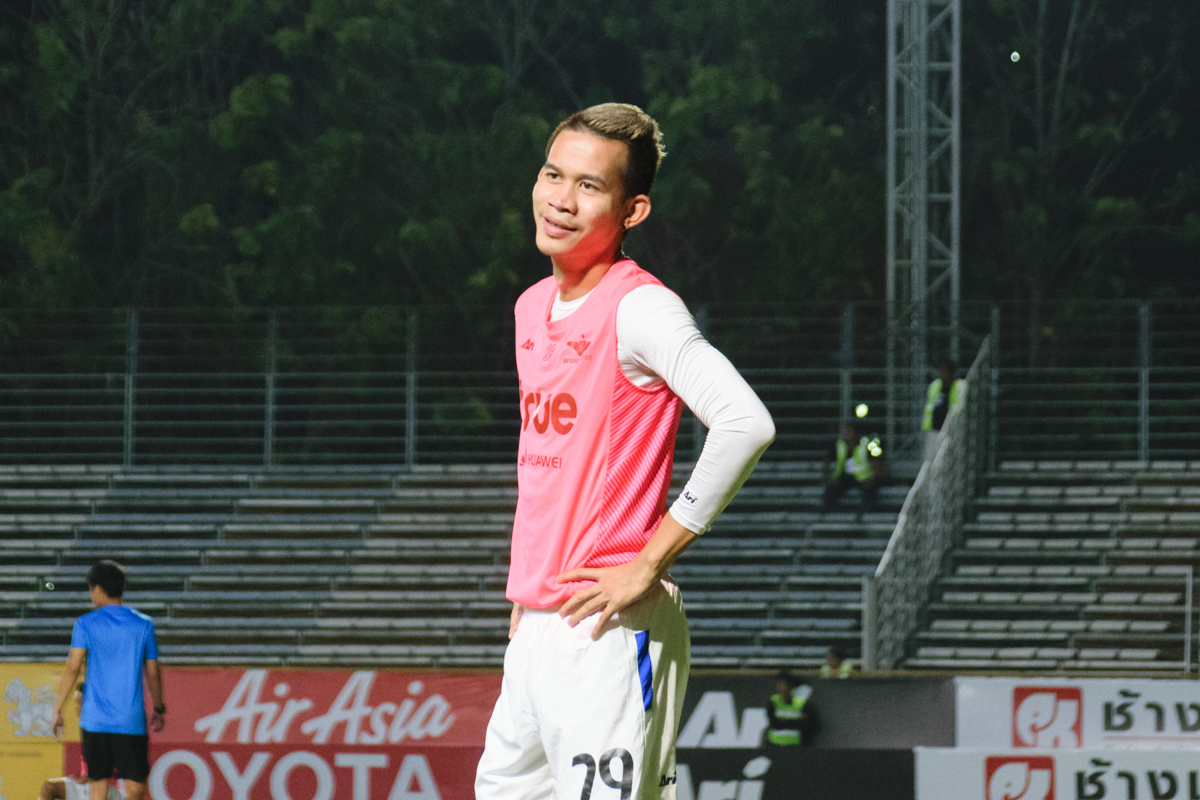 Sanrawat Dechmitr